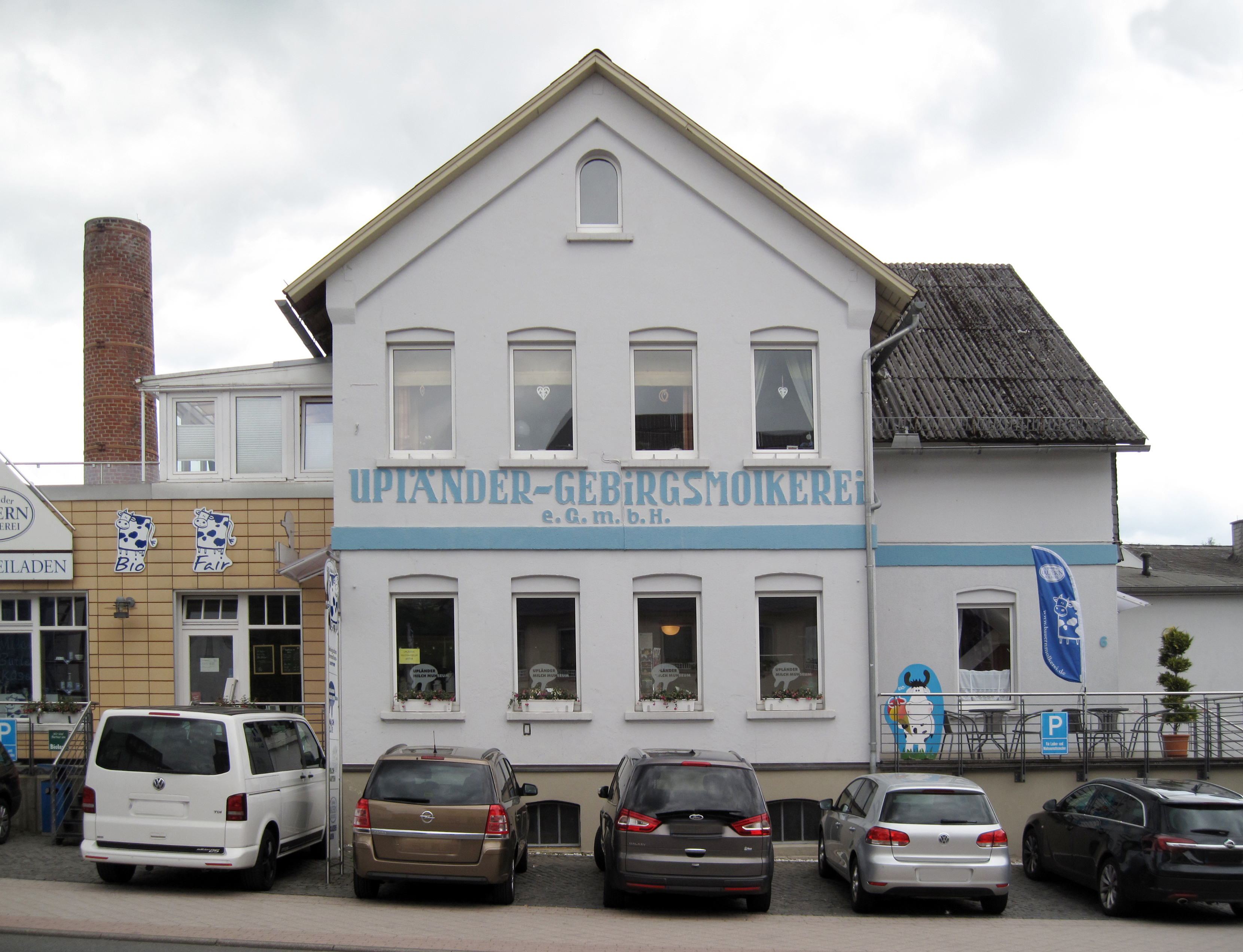 Das Milchmuhseum befindet sich in der ehemaligen Molkerei, Upländer Milchmuhseum, Korbacher Straße 6, Willingen - Usseln